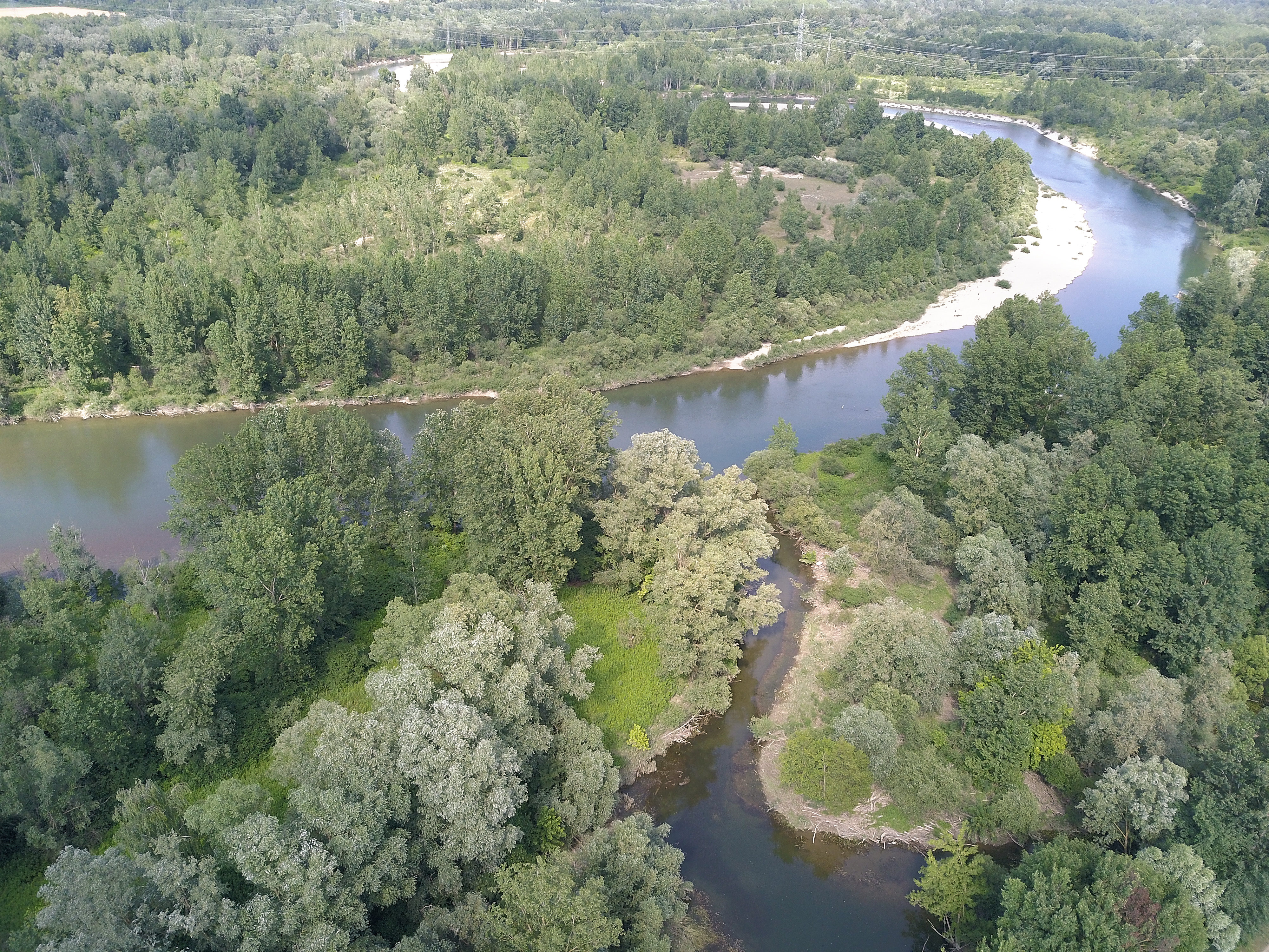 Zračna fotografija Ušća Plitvice u rijeku Dravu. Mali Bukovec 2018.